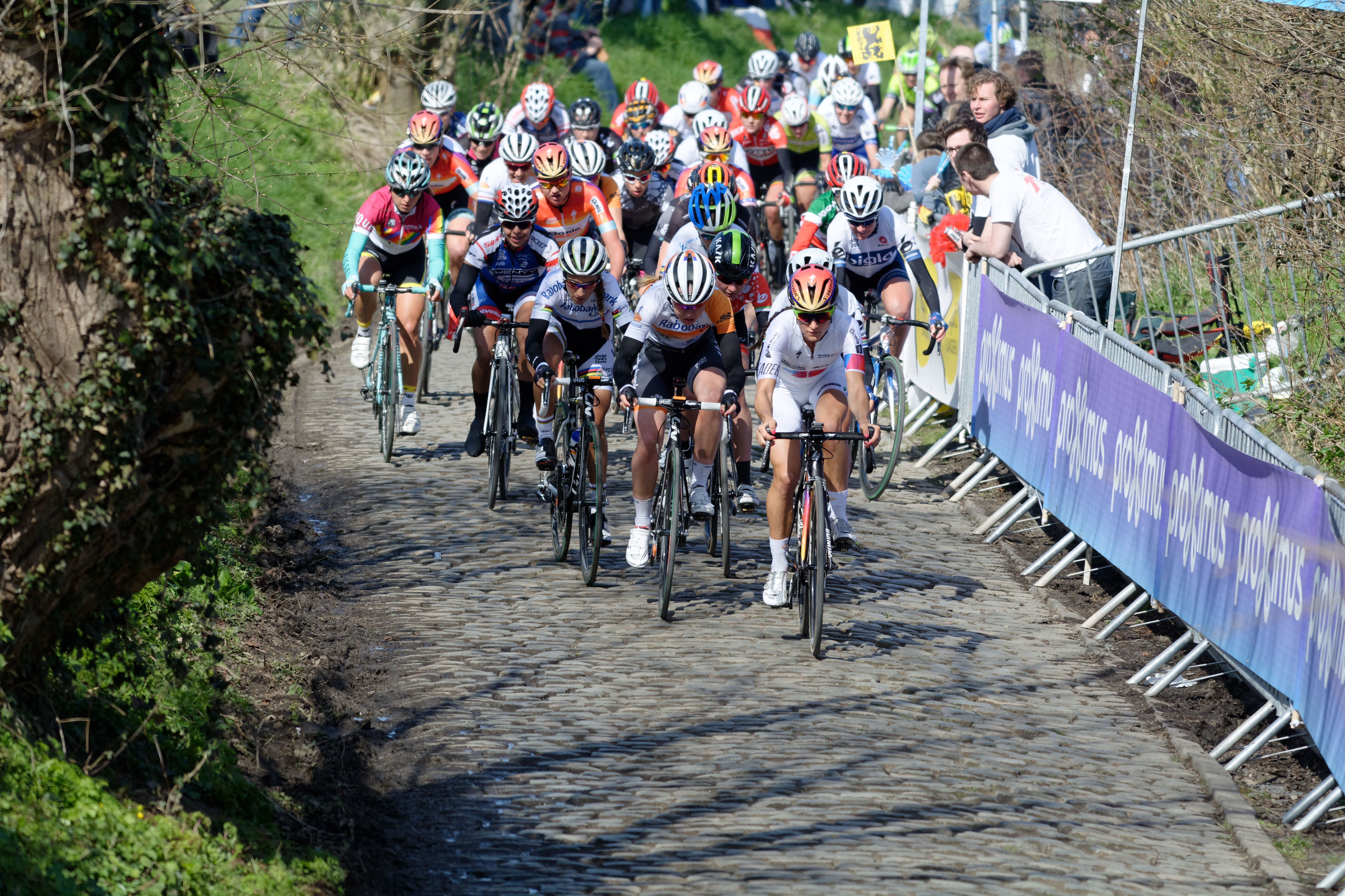 D71_6386_DxO